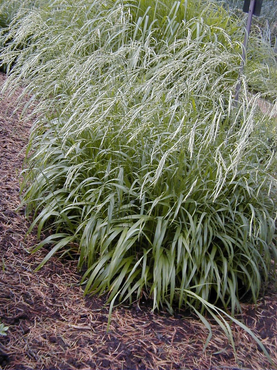 Brachypodium sylvaticum. Real Jardín Botánico, Madrid, España.